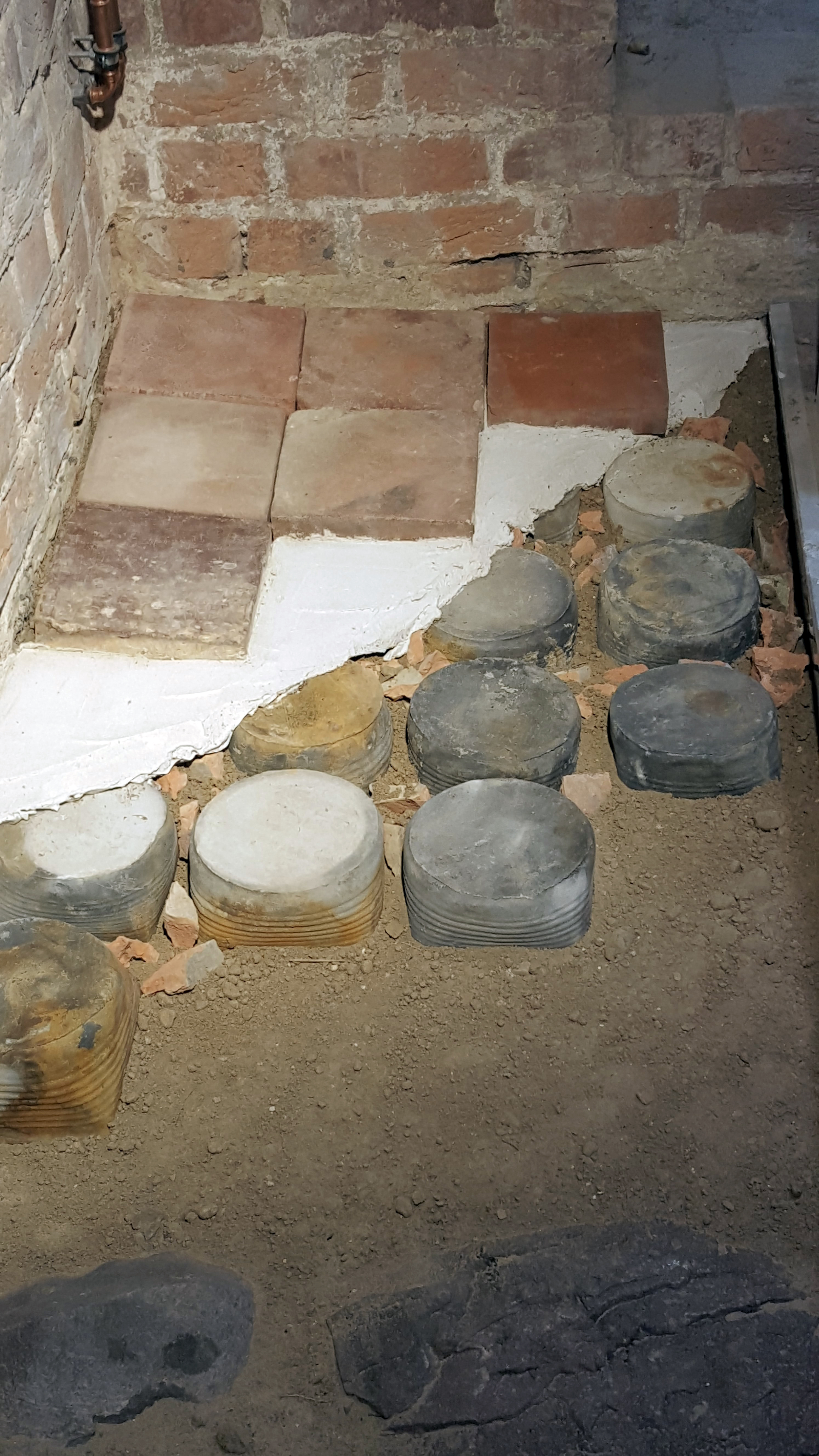 Der aufwändige mehrschichtige Aufbau des Kellerfußbodens mit den Isoliertöpfen zeugt vom Reichtum des Hauserbauers um 1452.